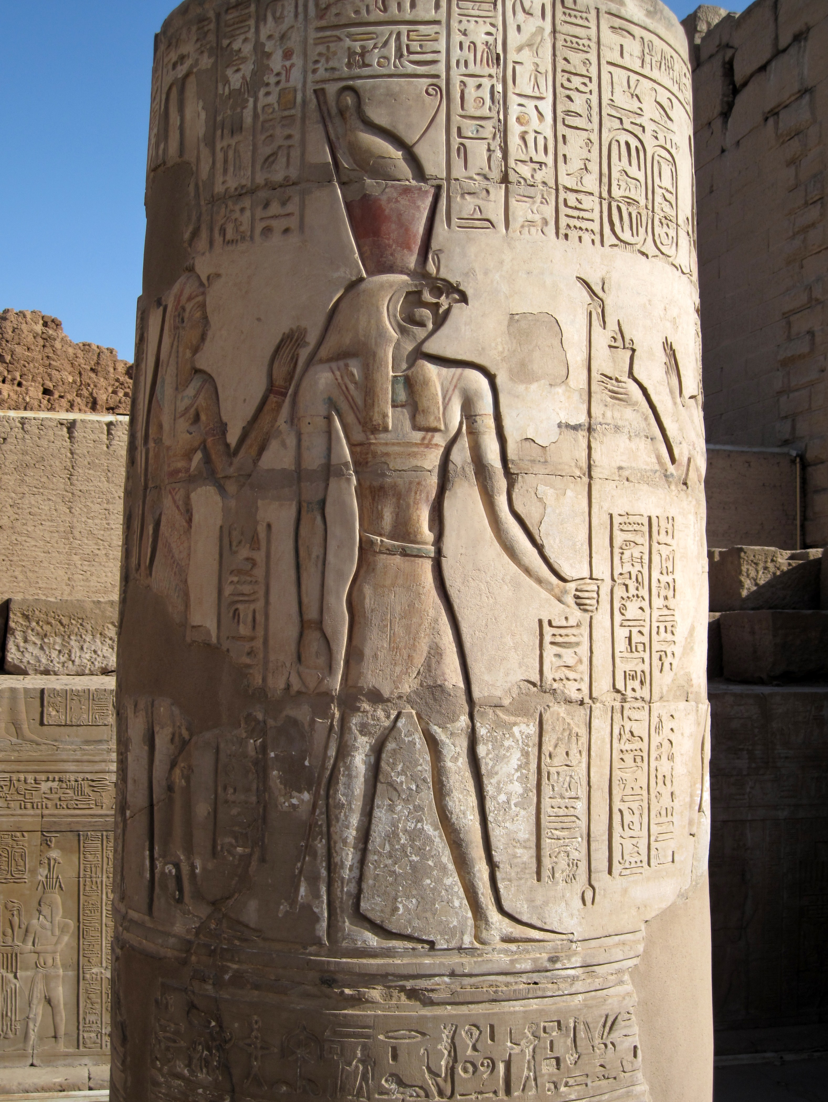 Relief auf einer Säule im Säulenhof des Tempels von Kom Ombo, Ägypten